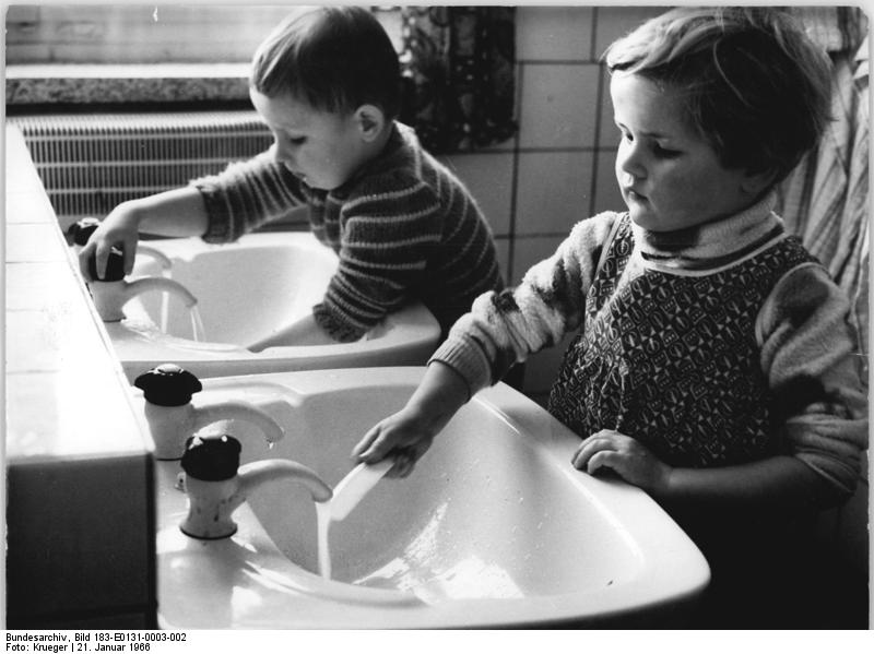 Neu-Holland, Waschraum im Kindergarten Zentralbild Krueger krue-zi 21.1.1966 Nicht nur zur Erntezeit.......sondern das ganze Jahr hindurch steht den Einwohnern der Gemeinde Neu-Holland im Bezirk Potsdam ein moderner Kindergarten zur Verfügung. Hier ein Blick in einen der Waschräume. 75 Kinder werden von 3 Kindergärtnerinnen und 2 technischen Kräften betreut.